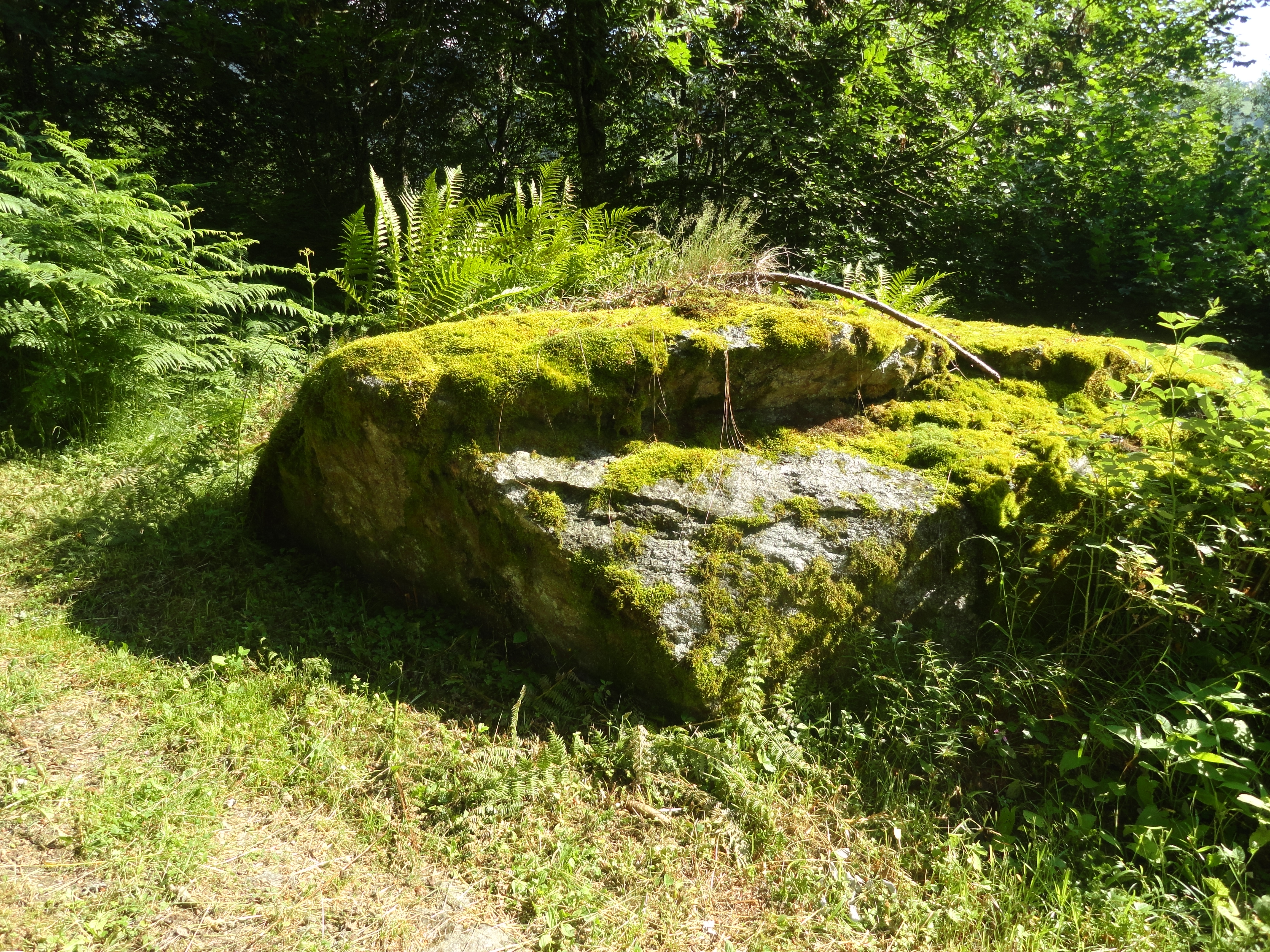 Katholische Pfarrkirche St. Zeno in Ladir: Stein des St. Zeno